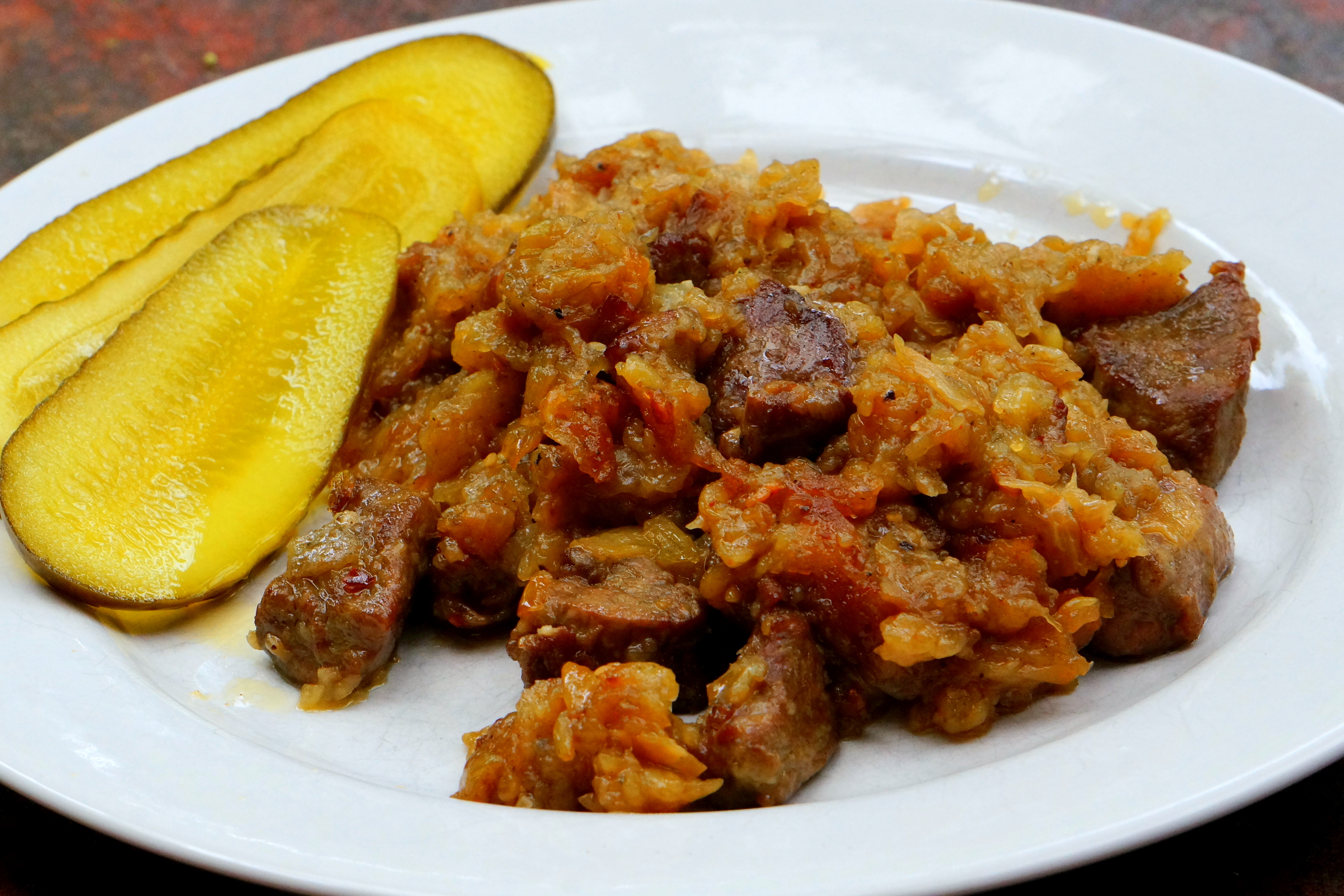 Czulent ziemniaczany z jagnięciną